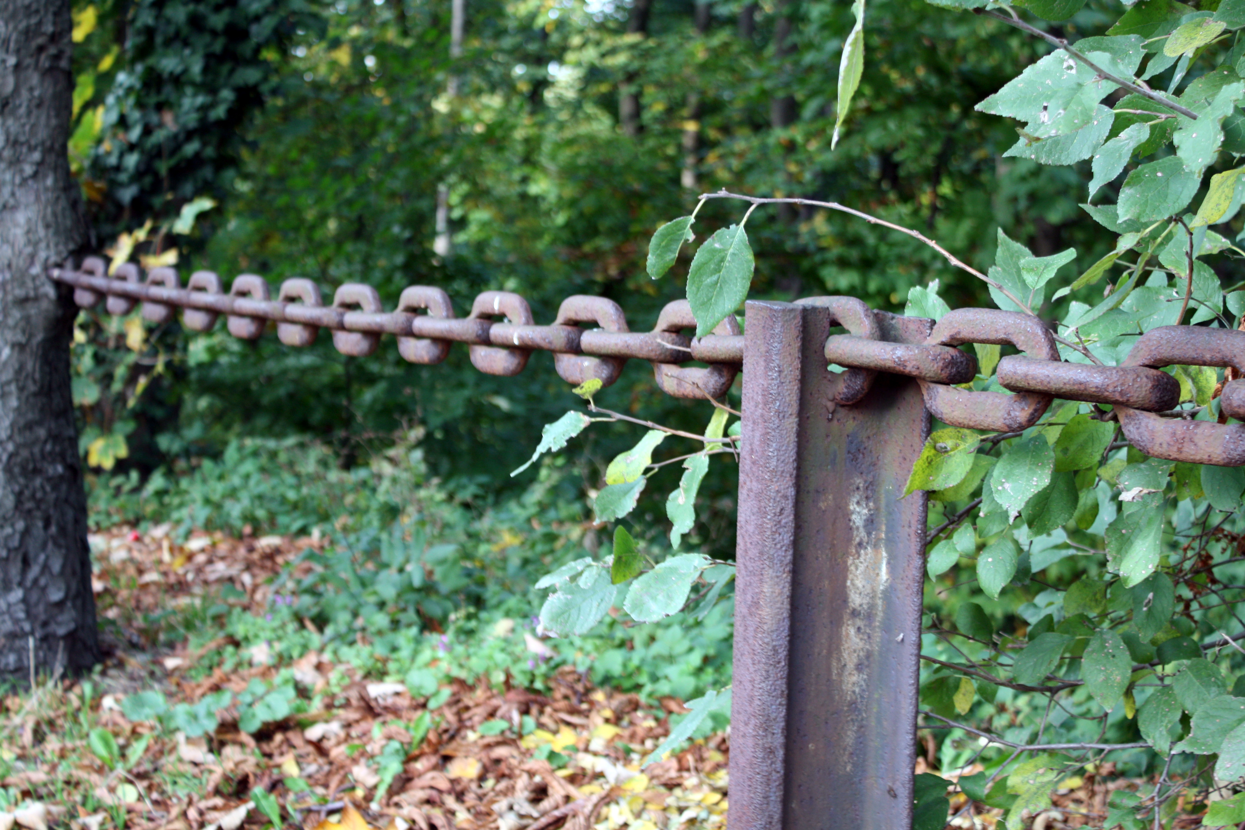 Alt-Hürth, Hürtherberg. Panzerketten und Schienen der alten Grubenanlgen dienen heute als Wegsicherung am Abhang